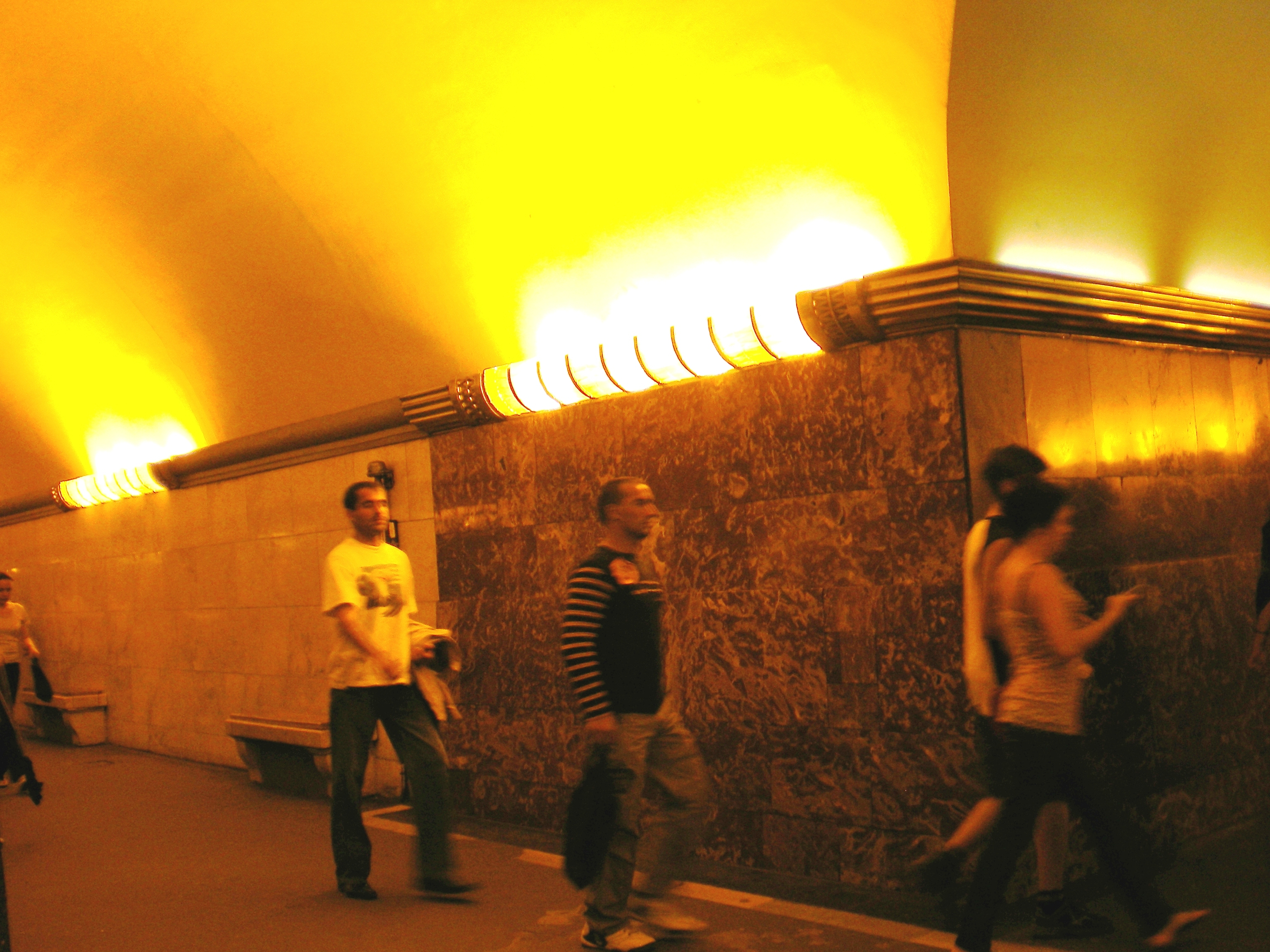 Станция метро «Площадь Ленина». Стык красной отделки пилона и белого мрамора путевой стены.